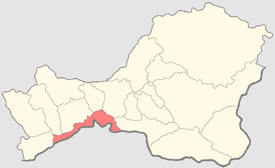 Овюрский кожуун на карте Тывы